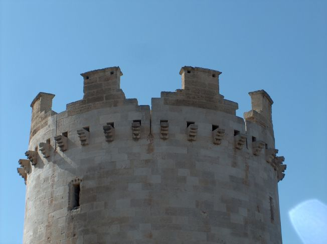 Fortezza svevo-angioina di Lucera - particolare della torre della regina Categoria:Lucera